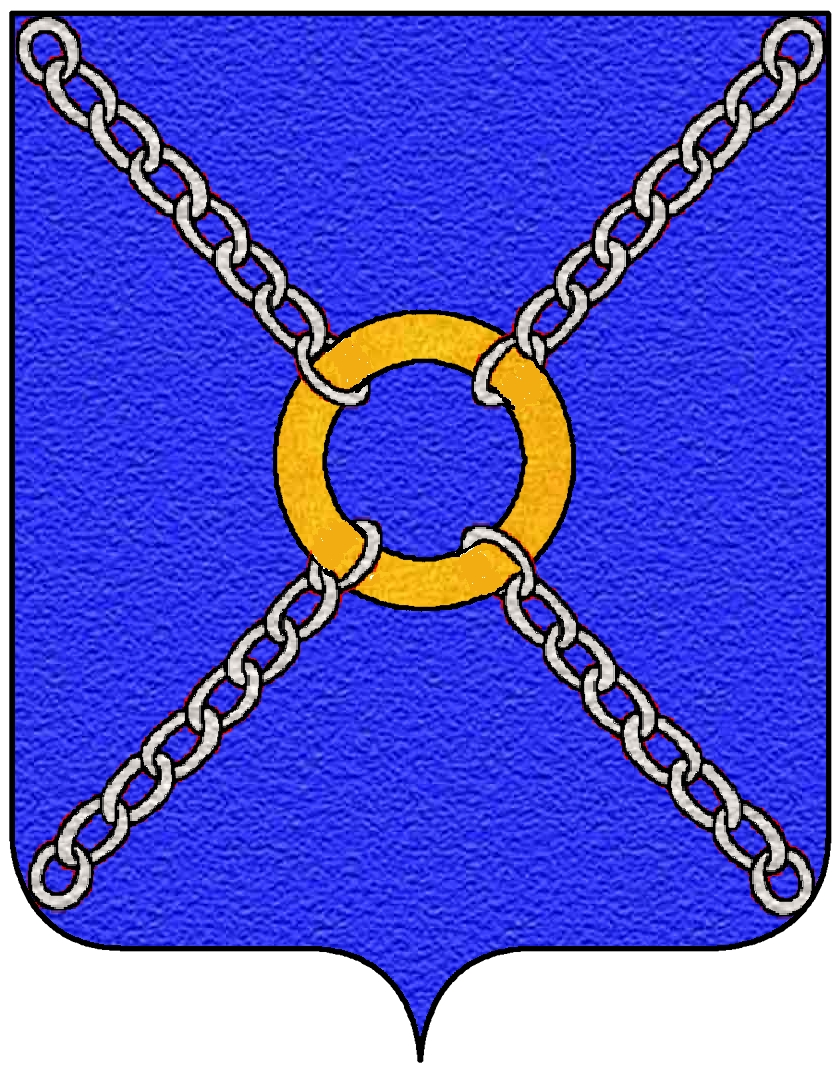 Stemma della famiglia Alberti